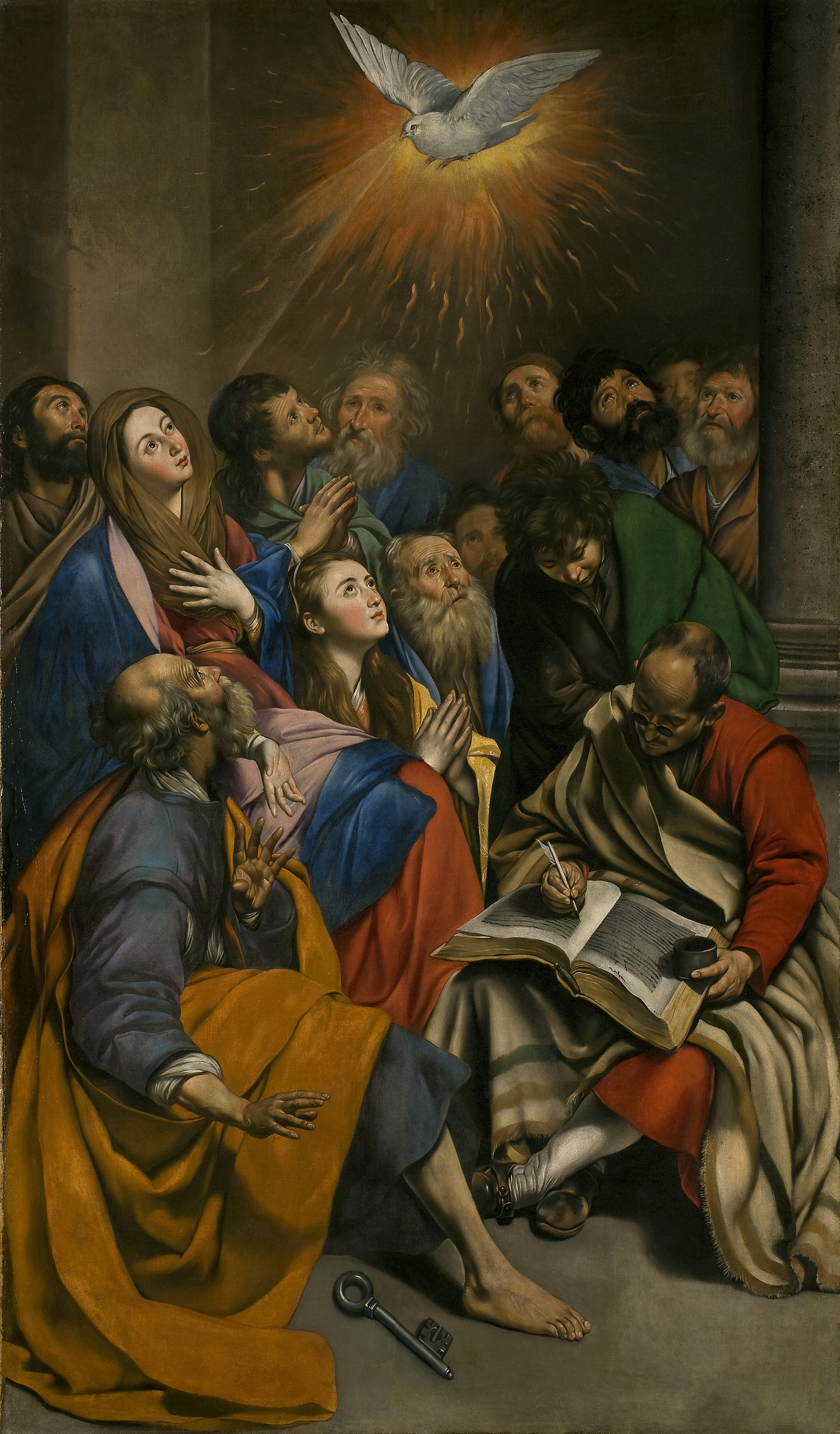 La obra representa al Espíritu Santo descendiendo y posándose sobre los apóstoles de Jesucristo.